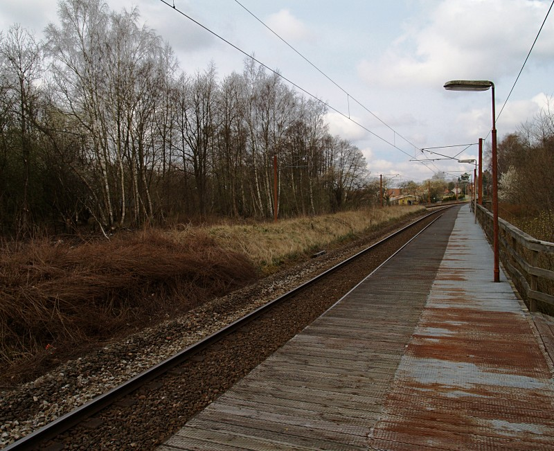 Høvelte station